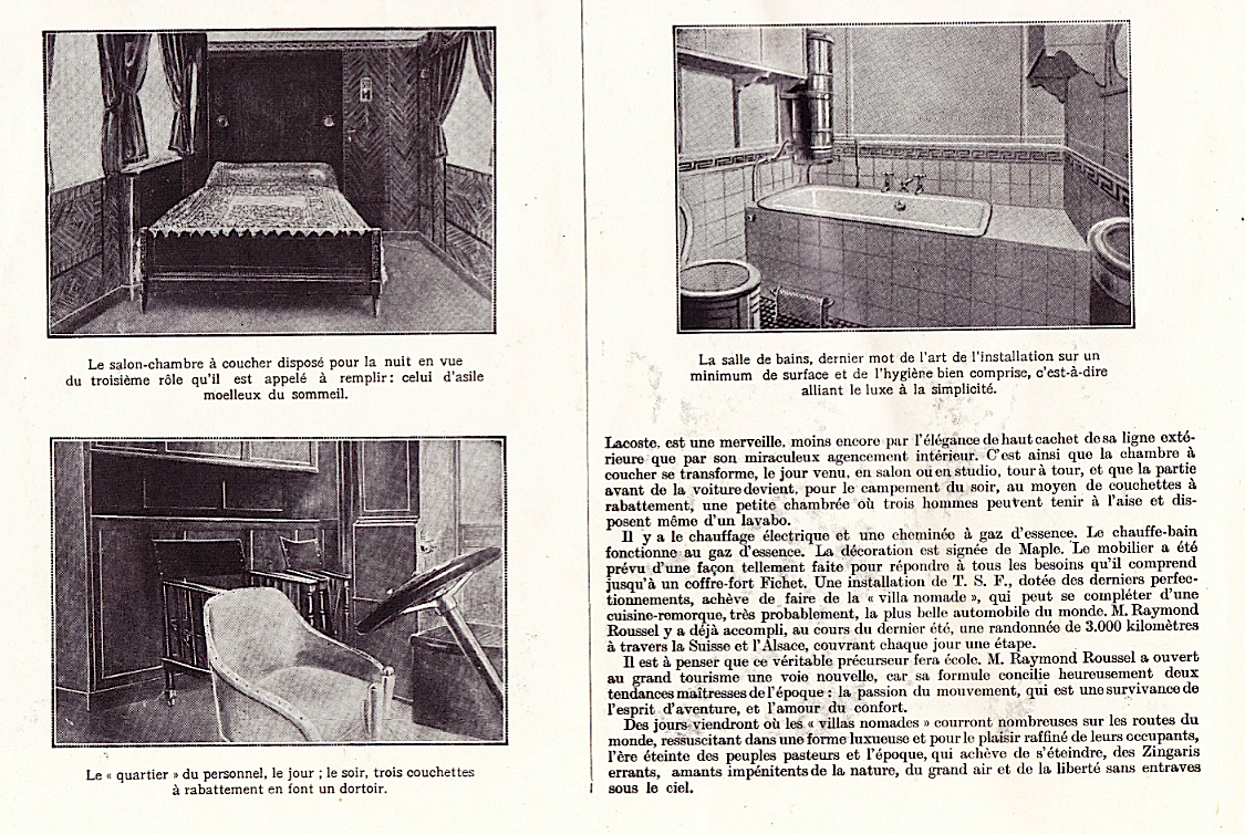 Tourisme précurseur: La Villa Nomade, In: L'Illustration — down page.